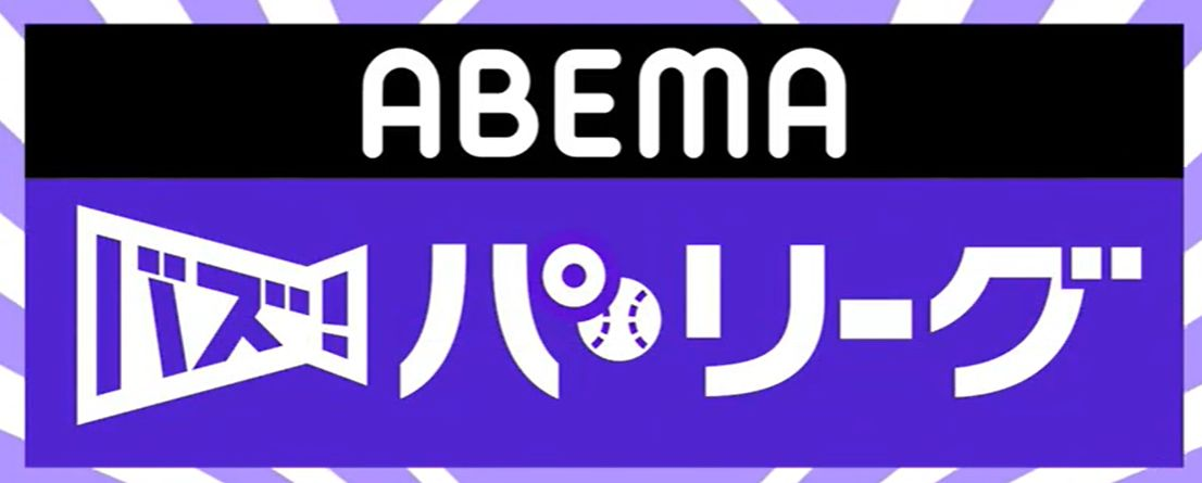 ABEMAバズ!パリーグ 番組タイトル